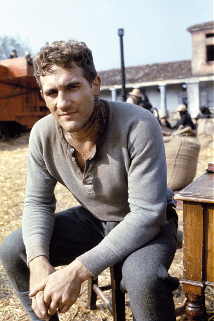 L'acteur français Gérard Depardieu lors du tournage du film italien 1900, sorti en 1976.